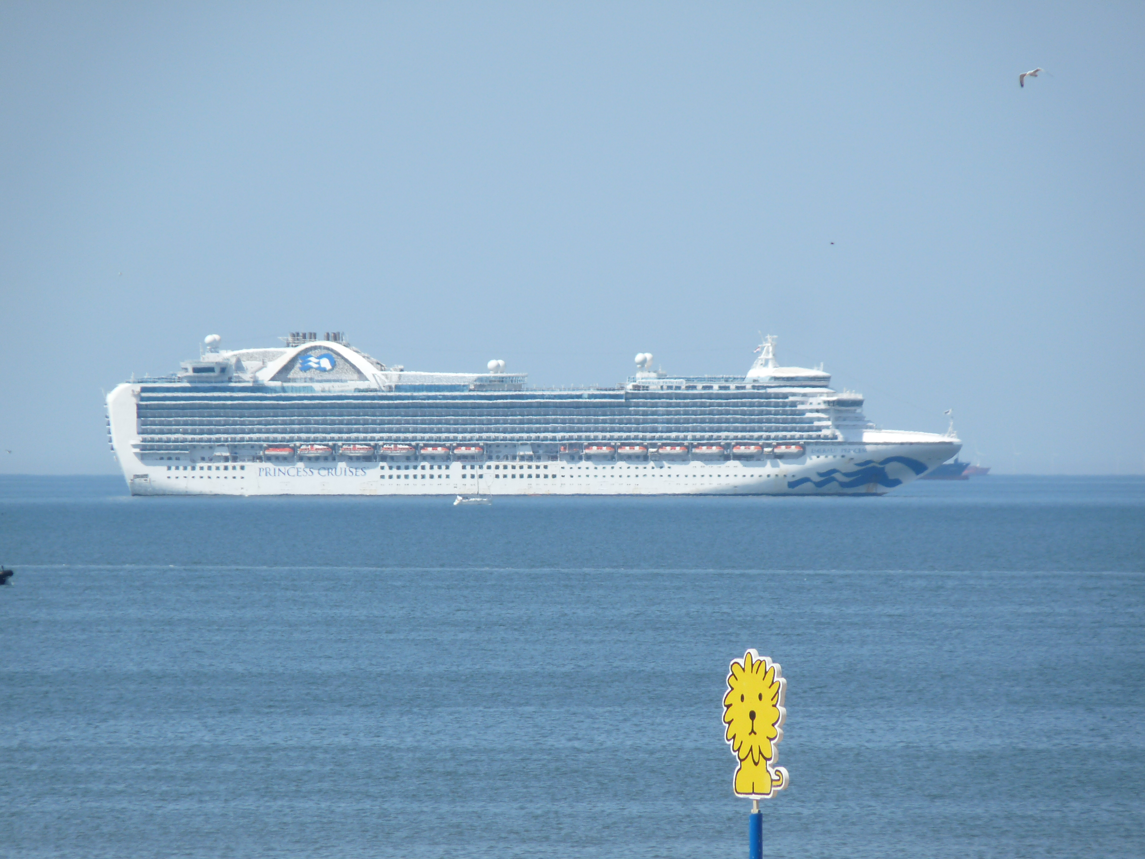 Cruiseschepen voor anker bij Scheveningen. Genomen vanaf de dijk bij Scheveningen.